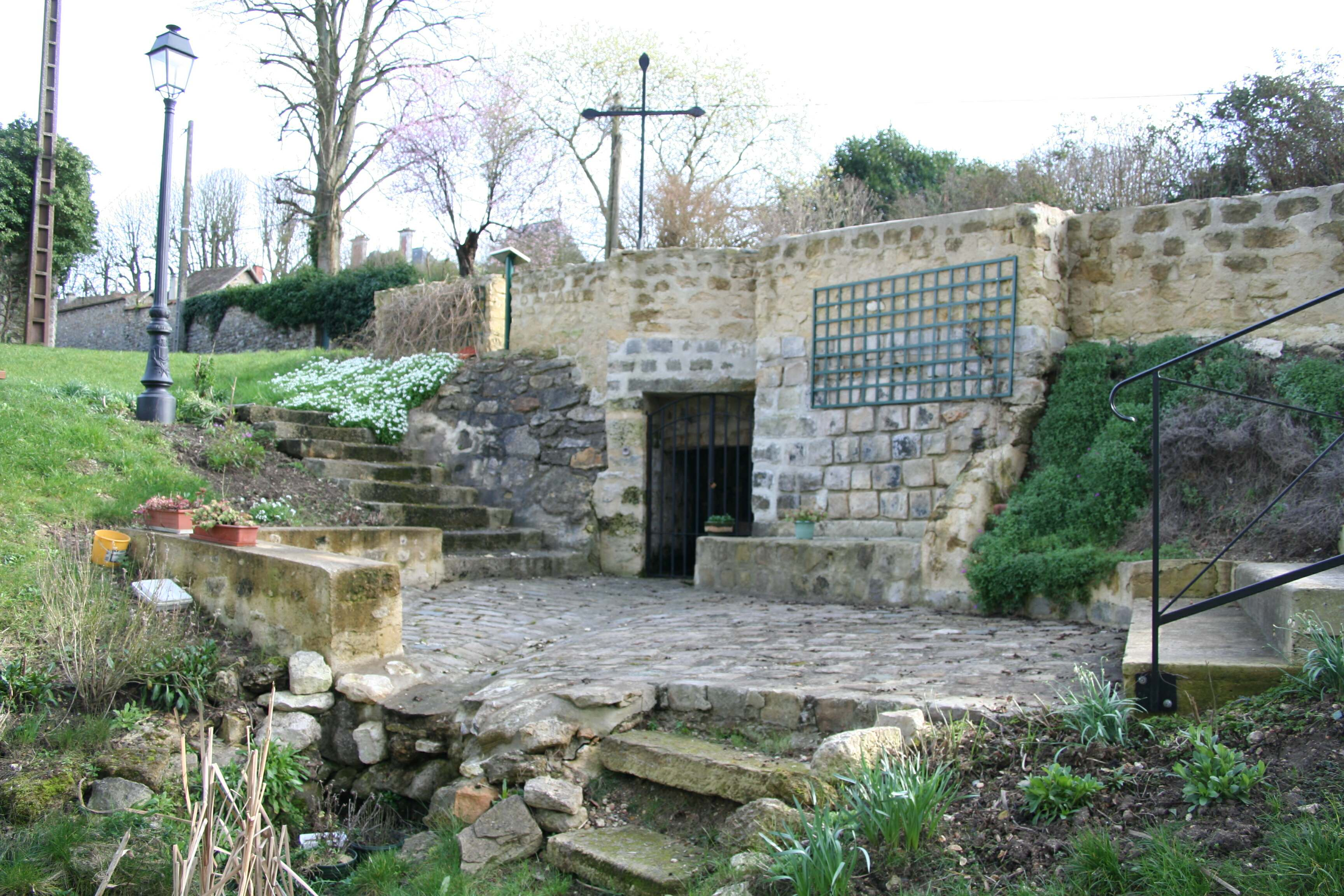 Fontaine Saint-Gaucher à Brueil-en-Vexin - Yvelines (France)